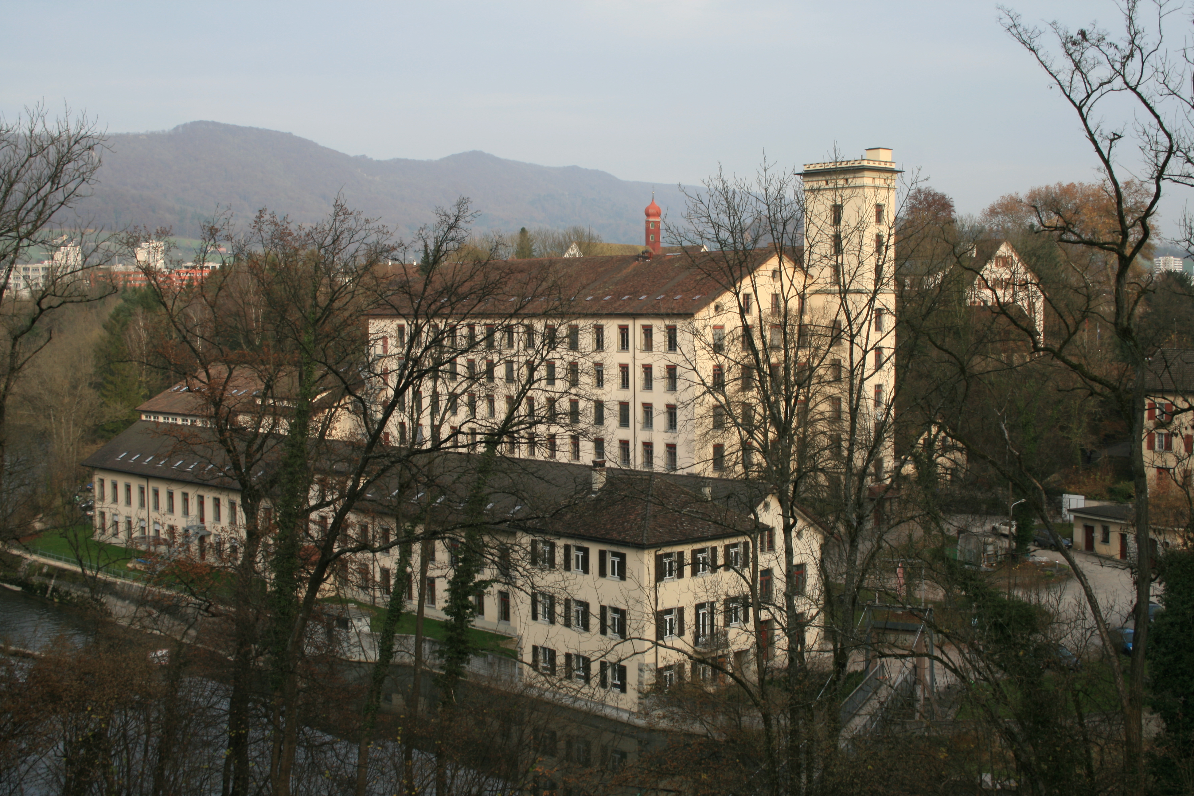 Ehem. Spinnereien Klosterstrasse 40 (hinten) und 42 (vorne), Wettingen